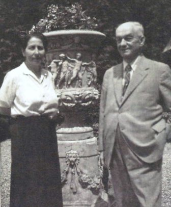 I coniugi Mattei in una foto degli anni '50 (Da Enea Mattei e Morbegno di Giulio Perotti)